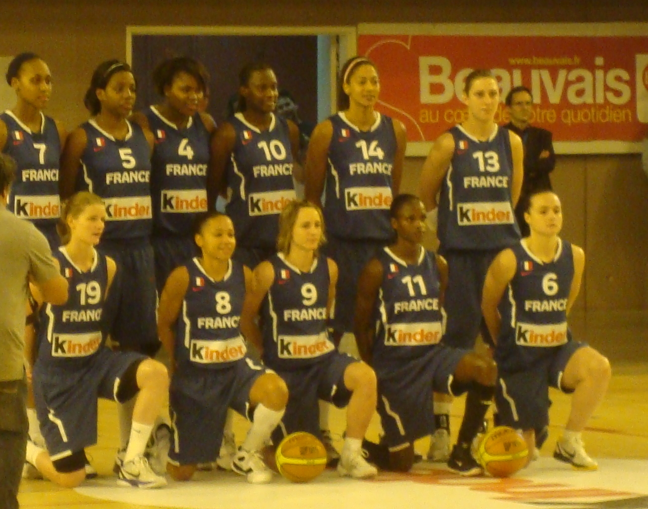 L'équipe de France féminine en stage à Beauvais le 11 juin 2011. De gauche à droite : Sandrine Gruda, Endy Miyem, Isabelle Yacoubou-Dehoui, Jennifer Digbeu, Emmeline Ndongue, Aurélie Bonnan (debout), Florence Lepron, Edwige Lawson-Wade, Céline Dumerc, Emilie Gomis, Clémence Beikes (assises). Manque Marion Laborde.